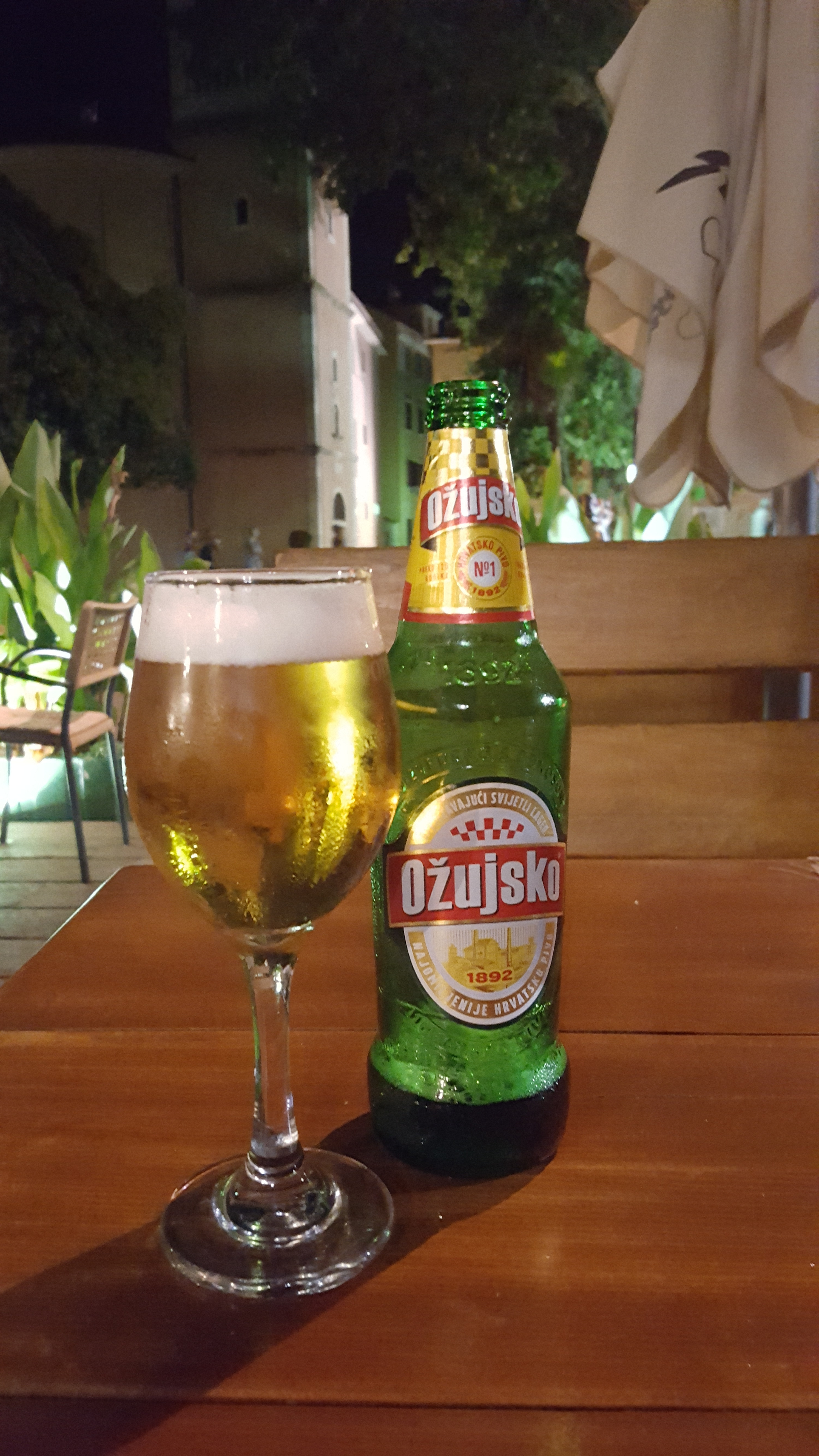 Ožujsko Bier